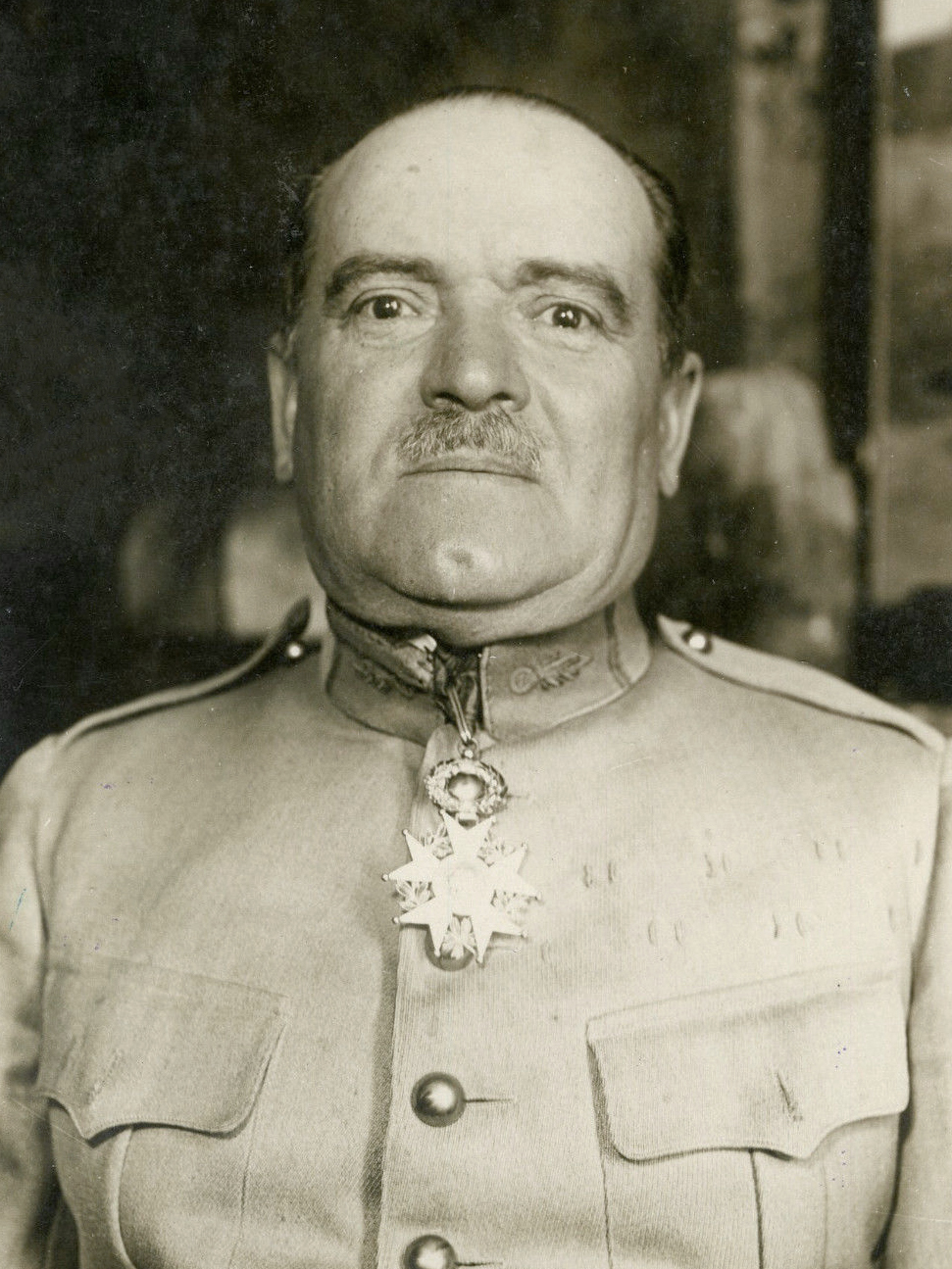 "Le Colonel RAYNAL (anniversaire de Verdun 1930)" Photo originale G.DEVRED / ROL